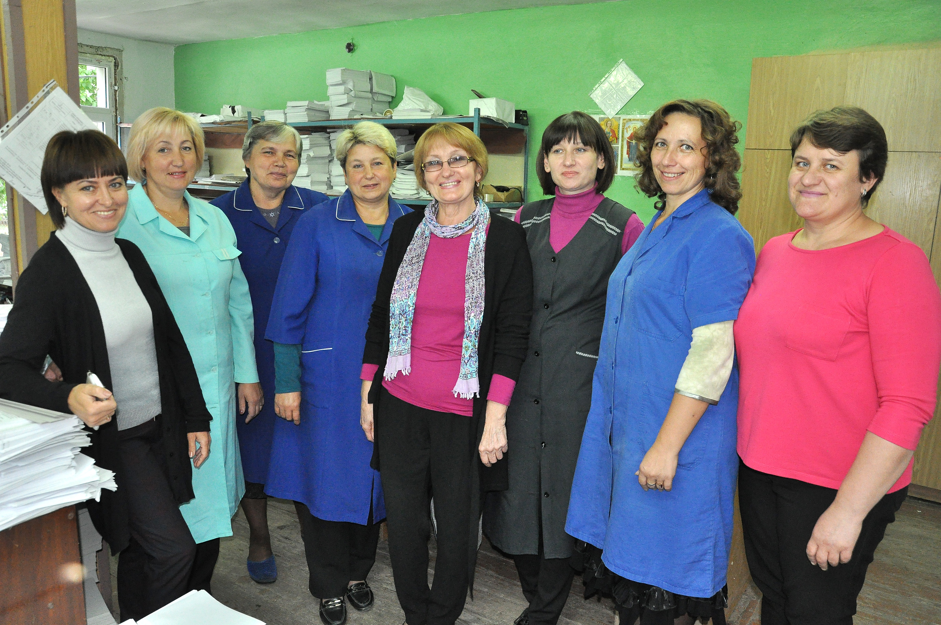 Колектив друкарні видавництва «Укрмедкнига»: технологиня Оксана Сенчук, палітурниці Ірина Смолій, Мирослава Савка, Марія Філь, помічниця проректора з НПР і соціальних питань Оксана Гулько, палітурниці Ольга Грицишин та Оксана Носаль, монтажистка Оксана Ступ’як.